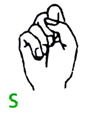 Der Buchstabe S im deutschen Fingeralphabet, entsprechend einer Infokarte des Landesverbandes Bayern der Gehörlosen e.V. (